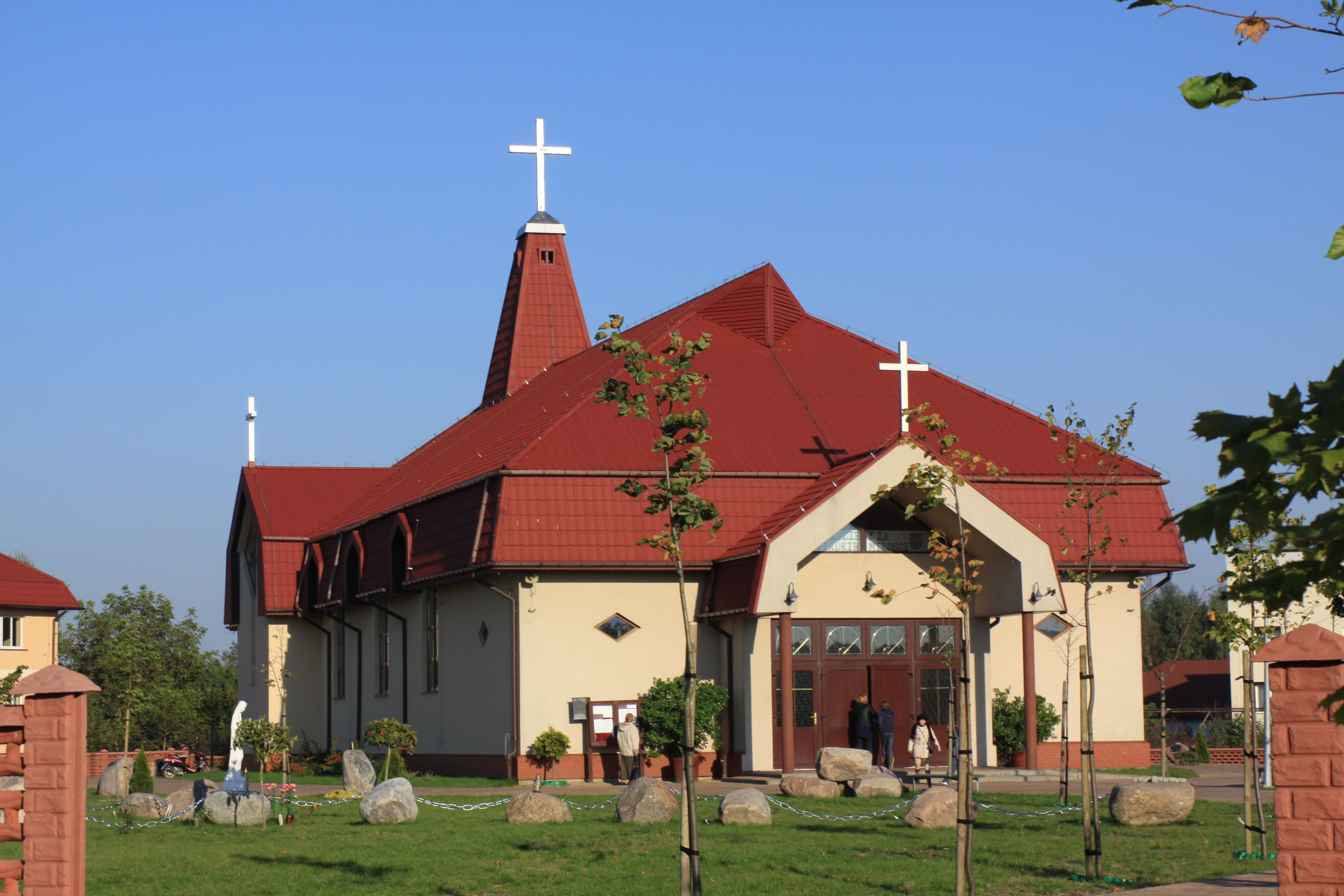 Kosciol w Słupcy pod wezwaniem bł.Biskupa Kozala, Słupca, ul. Kopernika